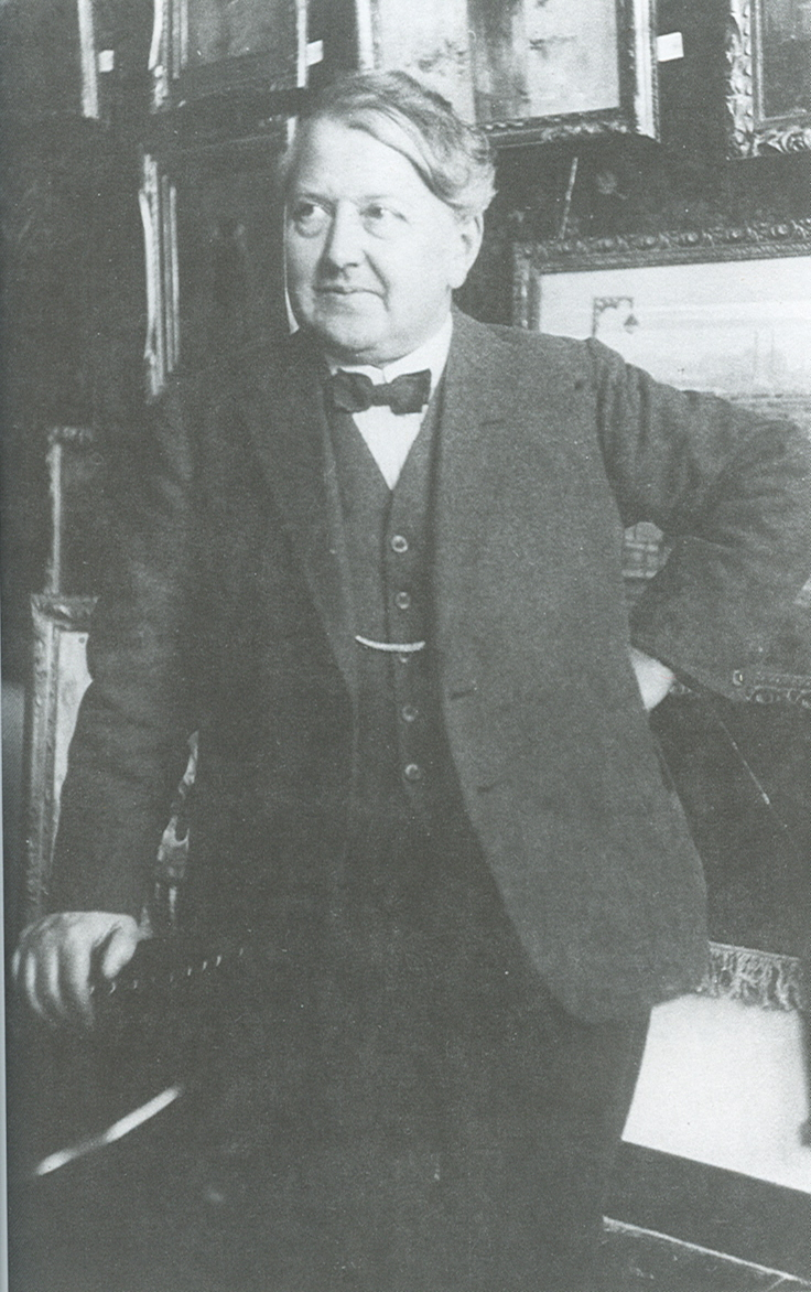 Guillaume Eberhard, 1920 tijdens tentoonstelling